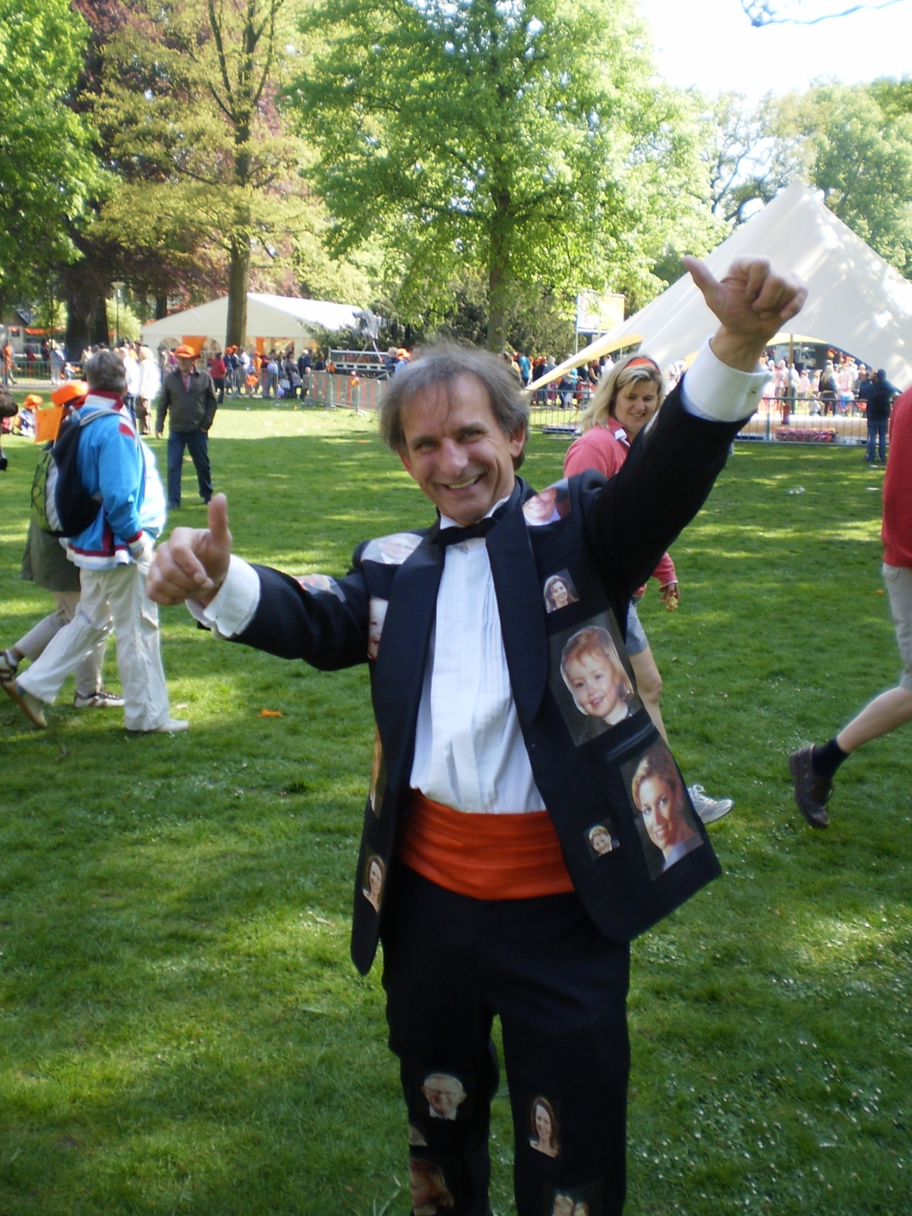 Johan Vlemmix, Koninginnedag 2009 in Oranjepark Apeldoorn